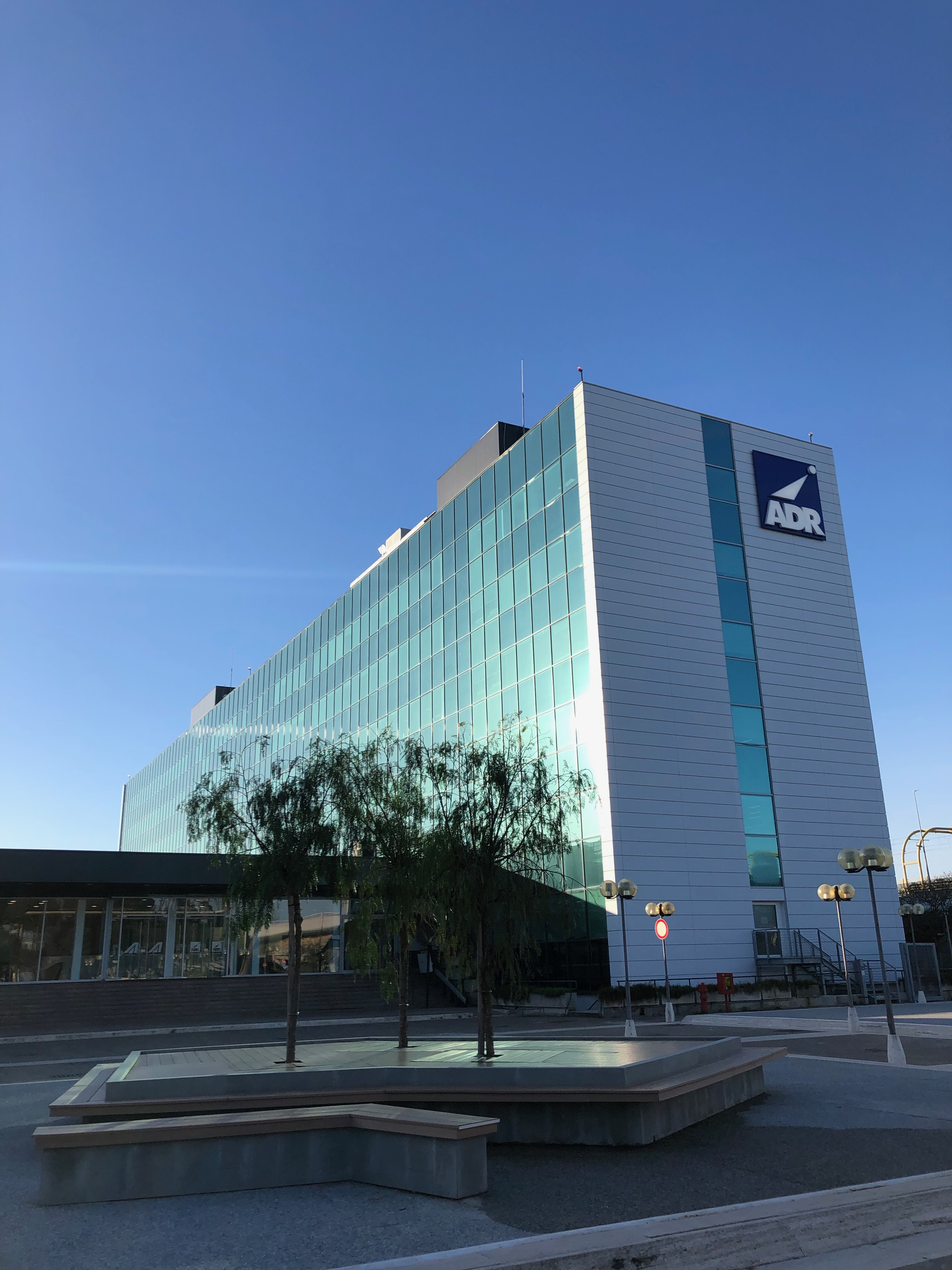 Nuova sede AdR